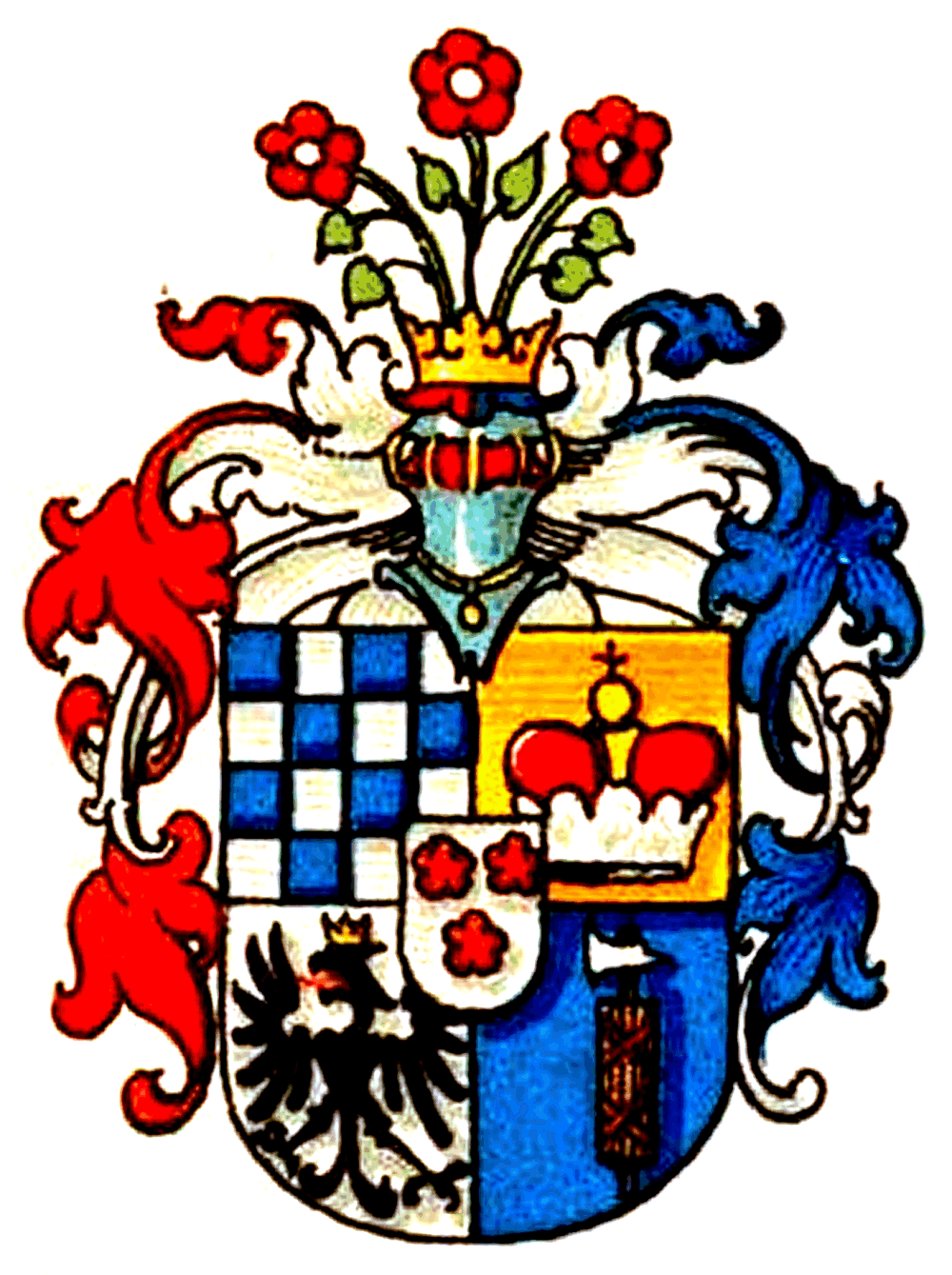 Stammwappen derer von Goßler